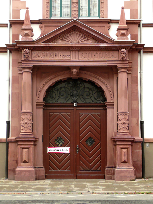 Gebäude Johann-Jobst Wagener'sche Stiftung in Hannover